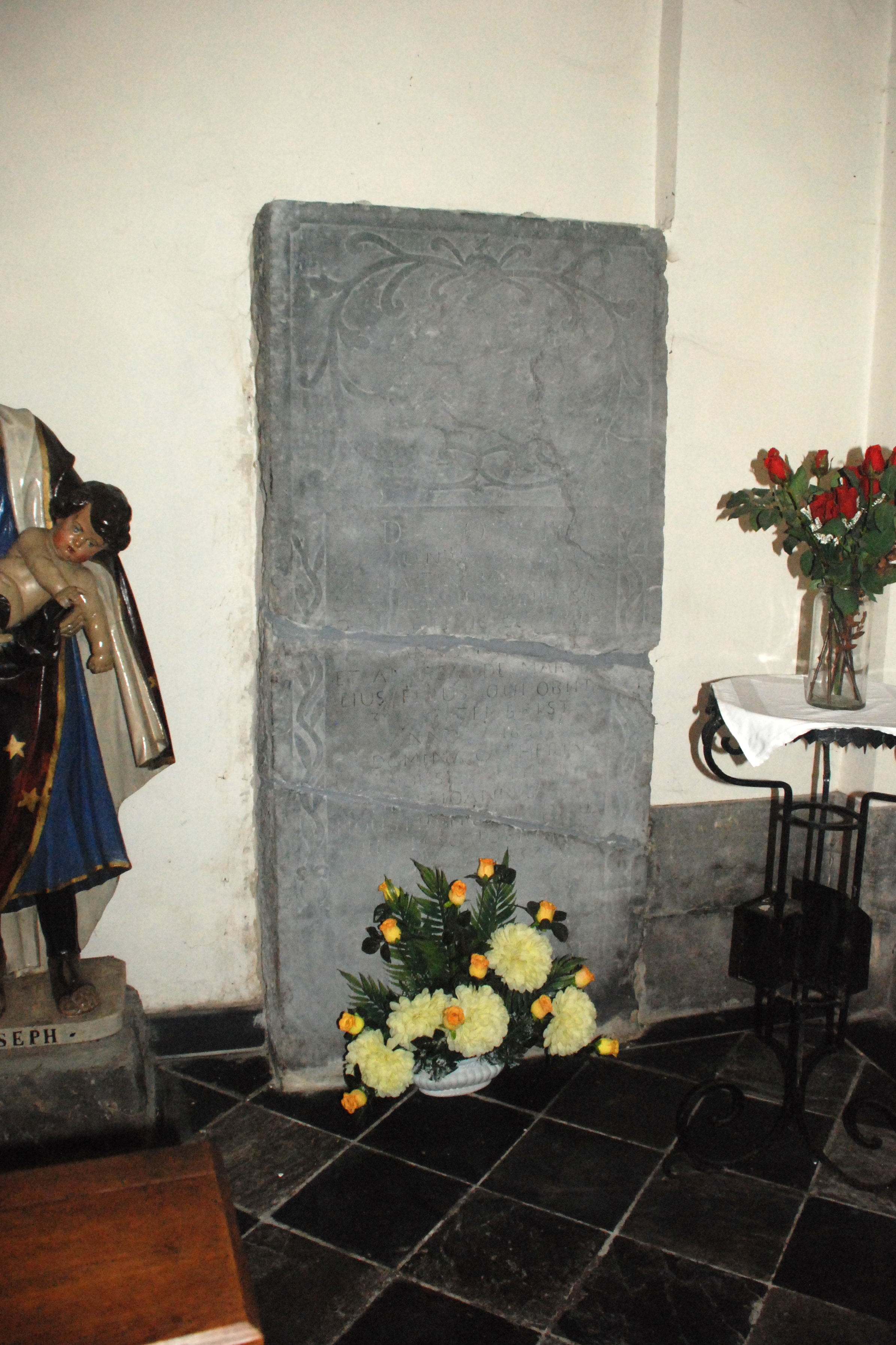 Belgique - Province de Namur - Viroinval - Nismes - église Saint-Lambert (1829)